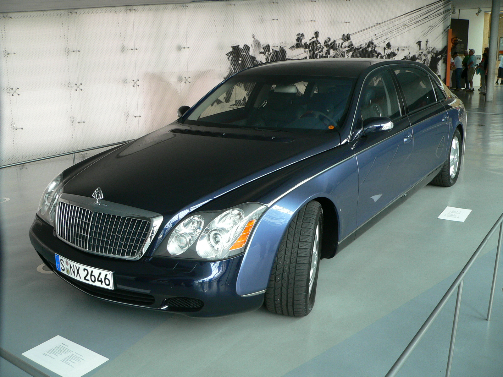 Maybach 62 im Zeppelin-Museum Friedrichshafen